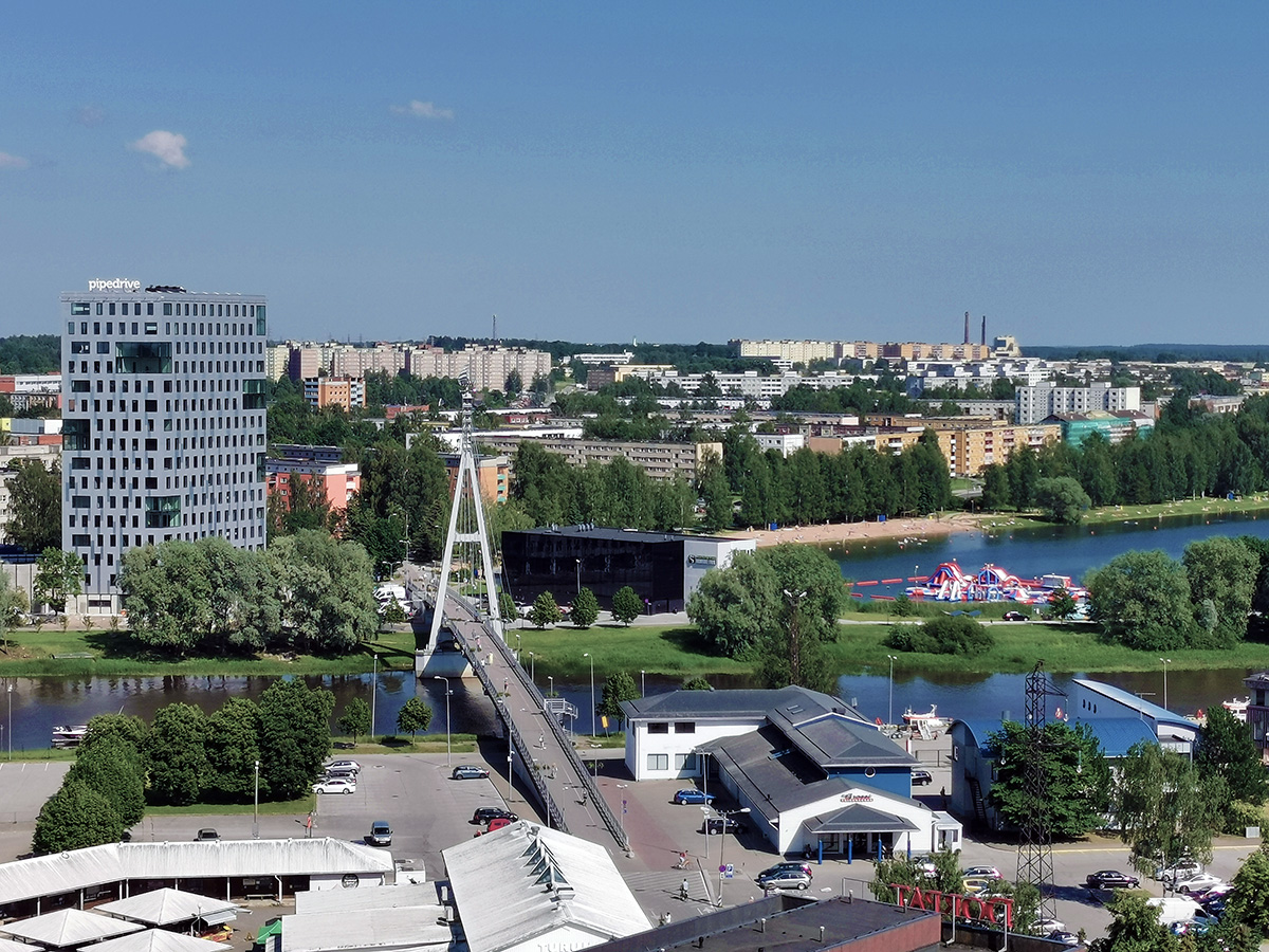 Emajõe Ärikeskusest avanenud vaade Annelinnale 2020. aasta suvel